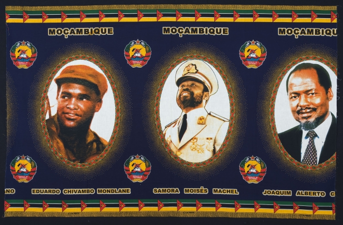 De afgebeelde personen op deze kapulana zijn, van links naar rechts: Eduardo Chivambo Mondlane, oprichter en eerste leider Frelimo, geboren in 1920, vermoord in 1969; Samora Moisés Machel, opvolger Mondlane, eerste president Mozambique, om het leven gekomen in 1986, en Joaquim Alberto Chissano, huidige president en opvolger van Machel, bij deze laatste is een gedeelte van het portret en de tekst niet geheel zichtbaar. Boven de portretten staat Moçambique. Boven en onder het wapen staat república de moçambique.